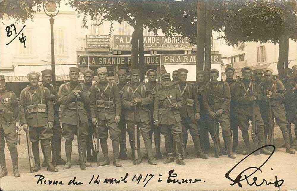 La Revue (défilé) du 14 avril 1917, Tunis, Tunisie